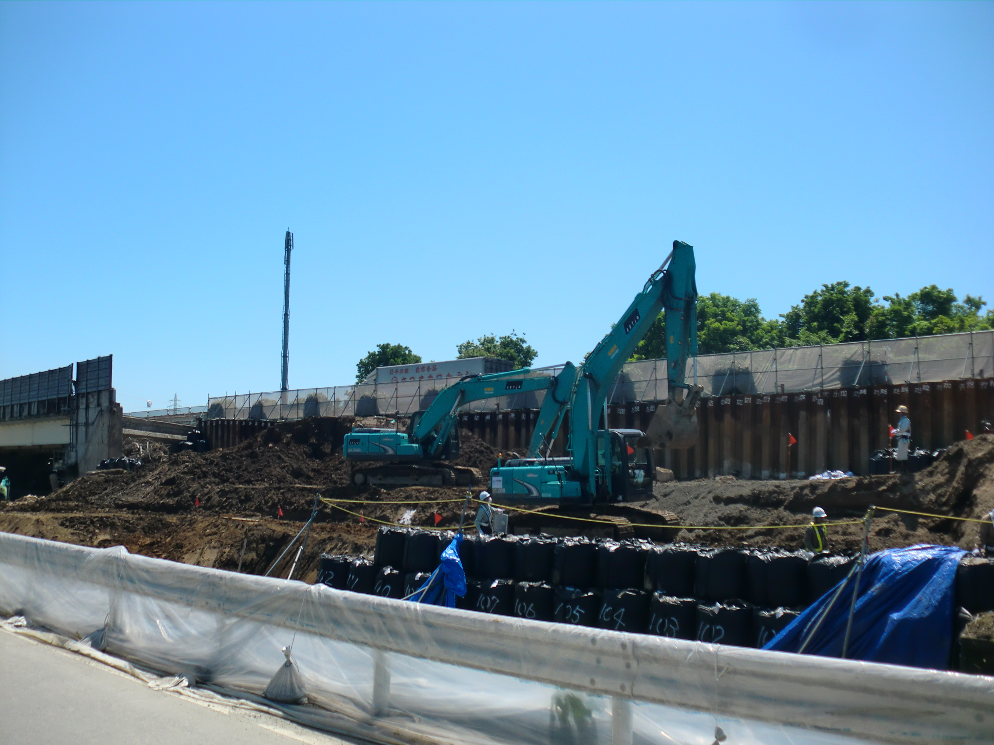 熊本地震で崩壊した九州自動車道嘉島JCT-益城熊本空港IC